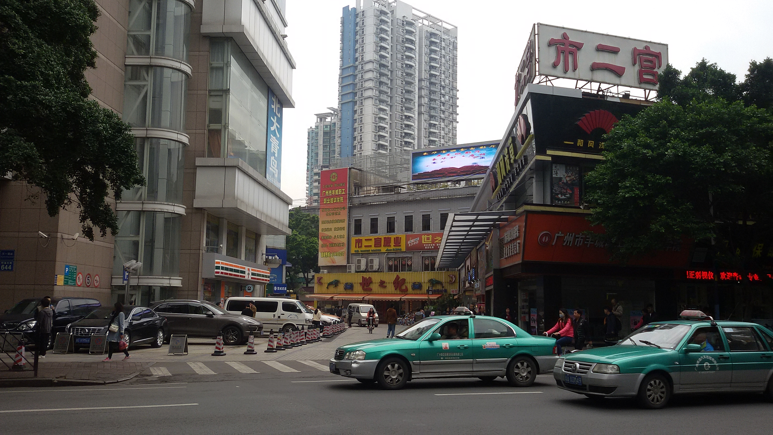 粵語: 廣州市第二工人文化宮